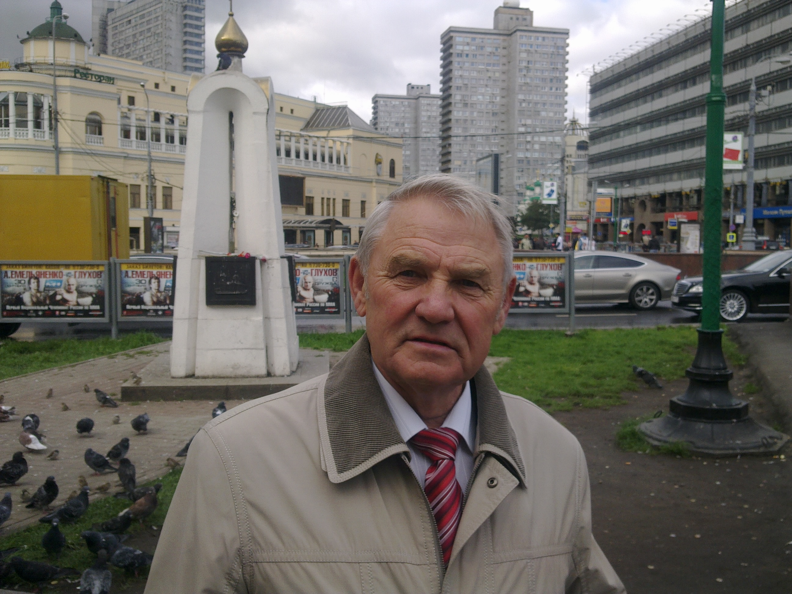 Писатель Владимир Лота. Новый Арбат. апрель 2015 года.